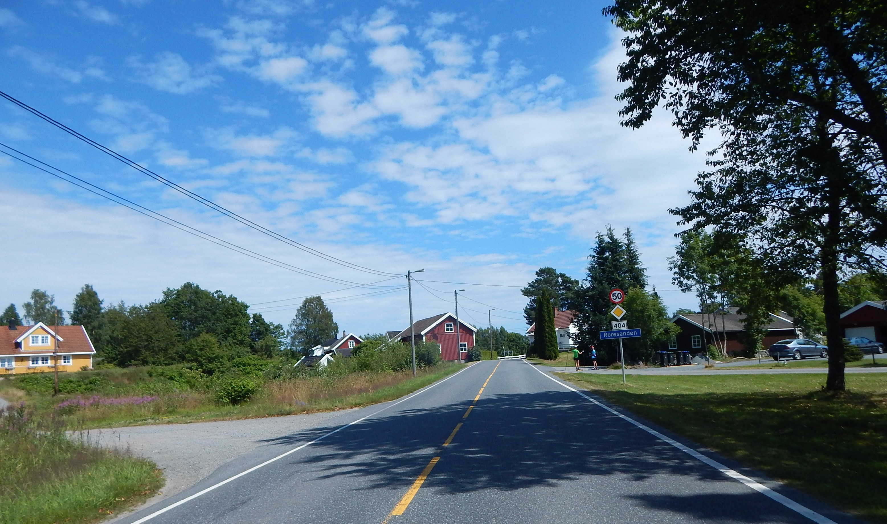 Fylkesvei 404 ved Roresanden utenfor Grimstad by